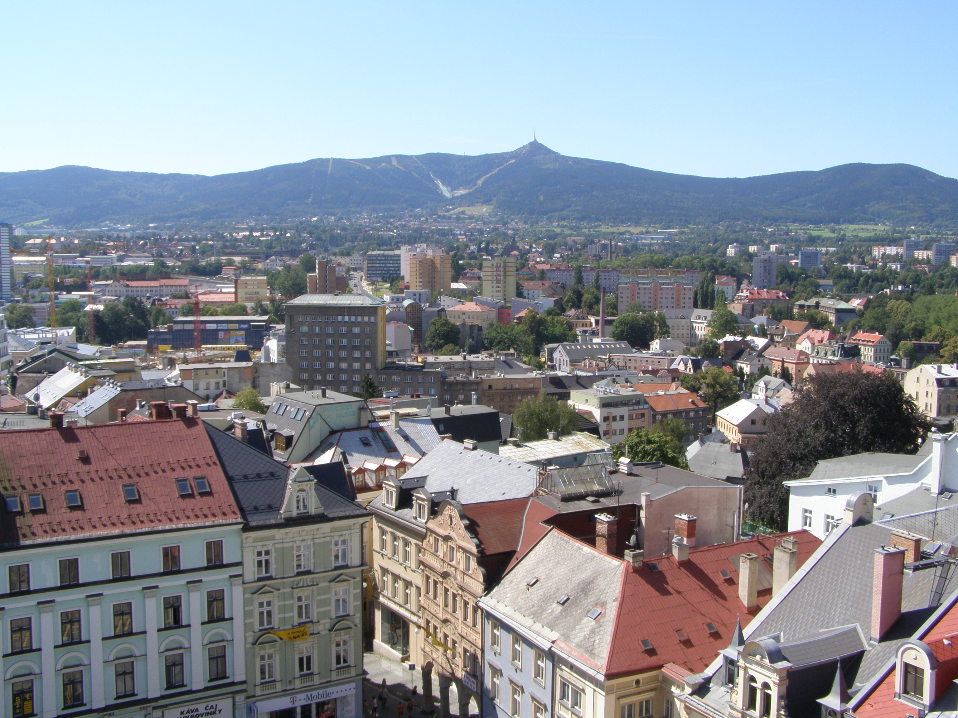 Liberec, jihozápadní pohled z věže radnice na město, v pozadí Ještěd